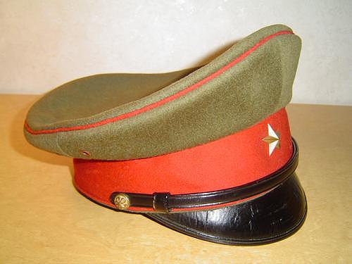 大日本帝国陸軍、昭五式・九八式軍衣期時代の将校軍帽（チェッコ式）。